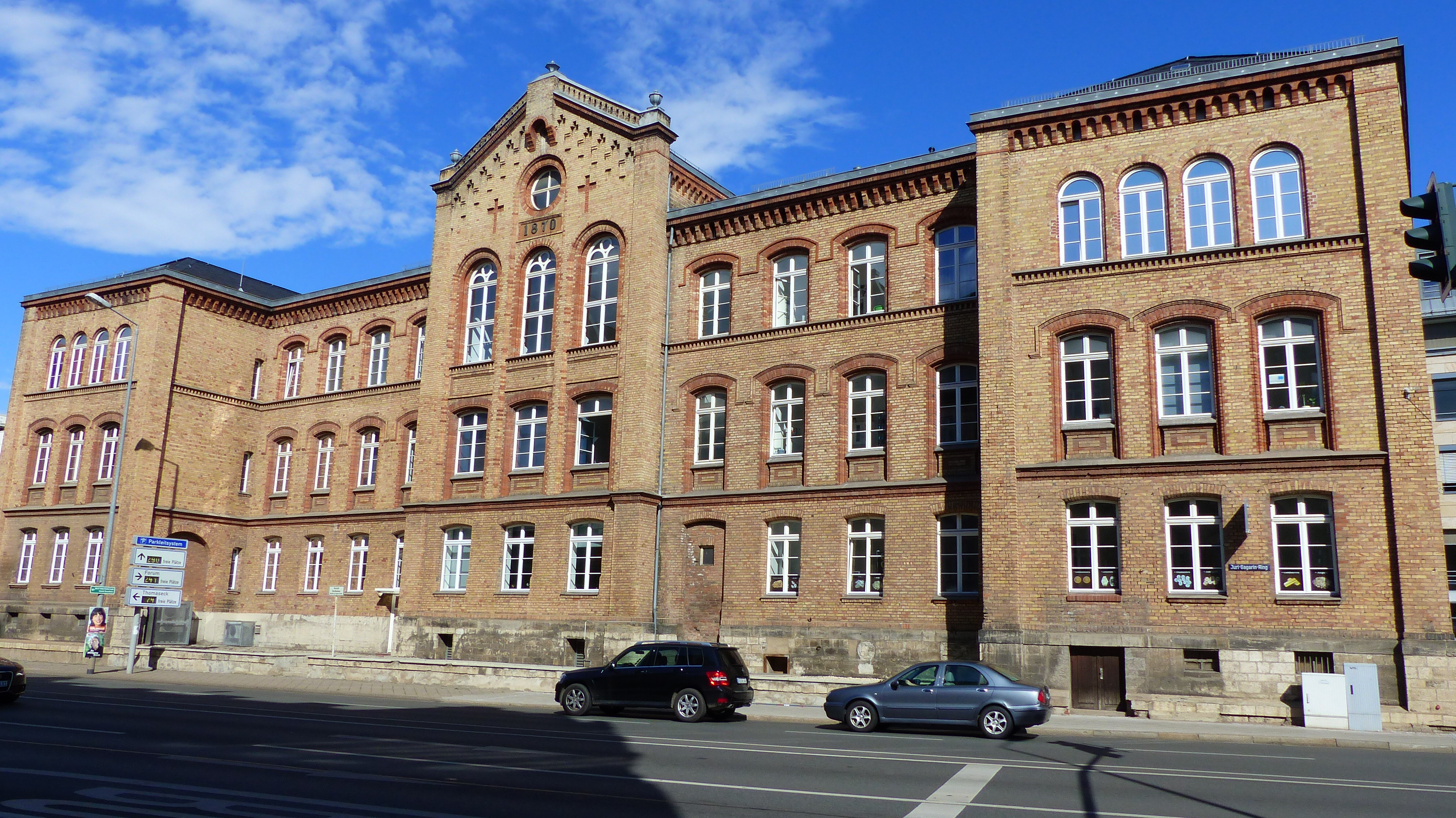 Denkmalgeschütztes Schulgebäude, Augustmauer 1, Erfurt